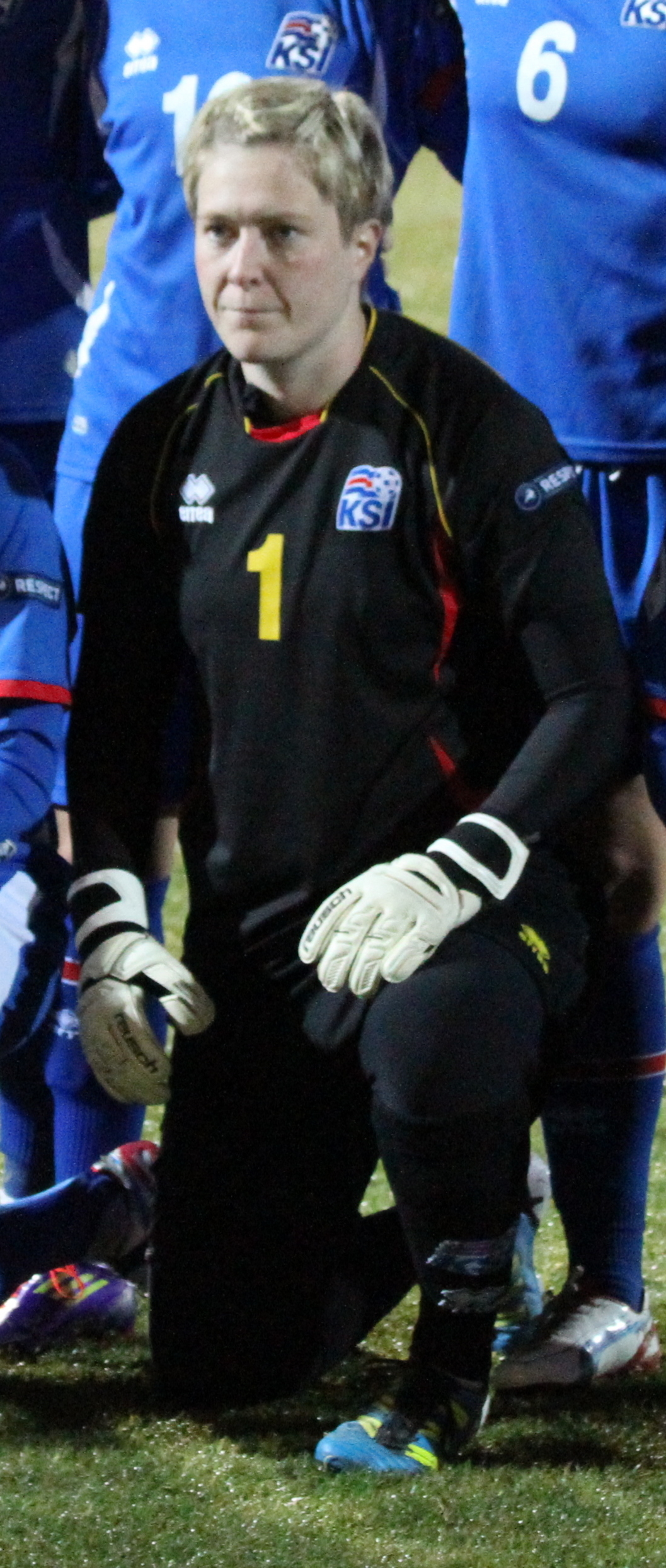 Þóra Björg Helgadóttir before Iceland-Ukraine 25/10/2012